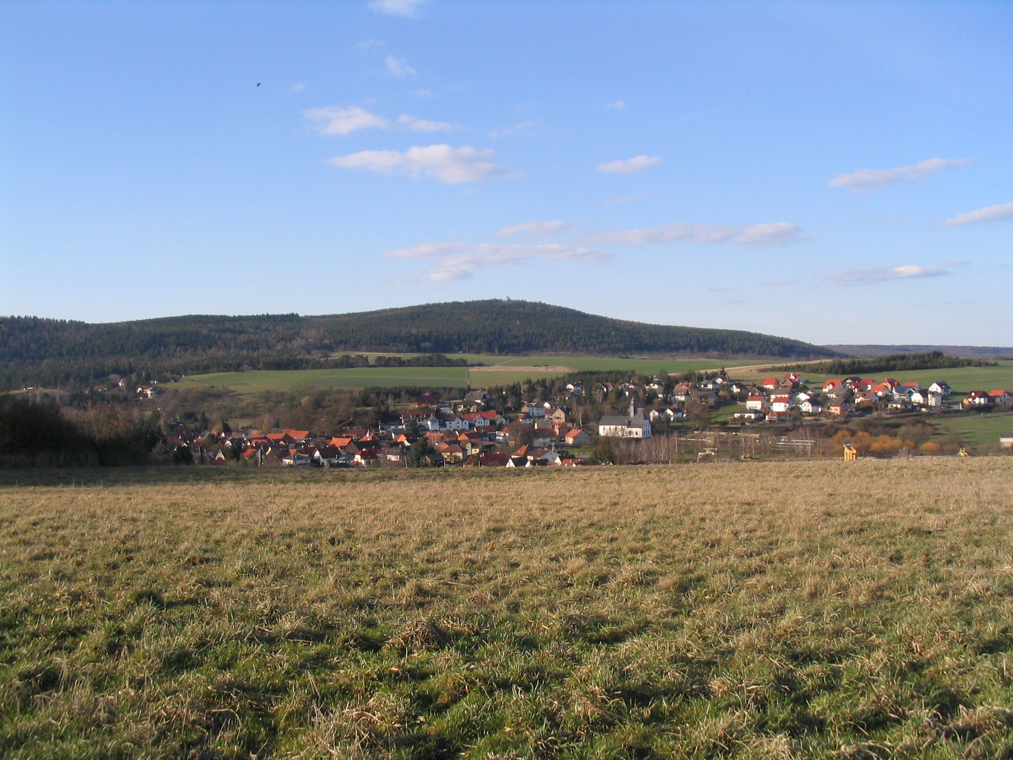 Der 486 m hohe Hausbeg im Taunus von Süden. Im Vordergrund Münster, ein Ortsteil von Butzbach